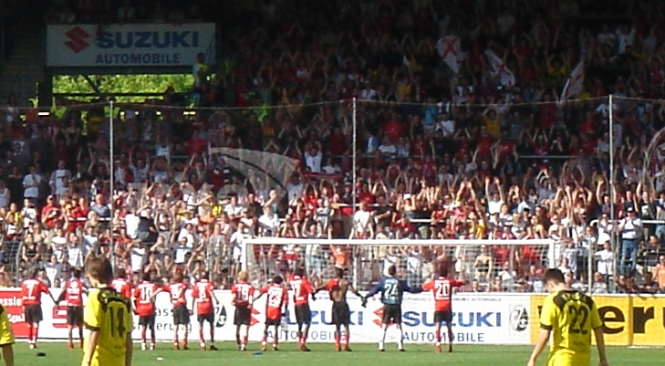 Badenova-Stadion des SC Freiburg gegen Borussia Dortmund. Mit 25.000 Zuschauern ausverkauftes Stadion